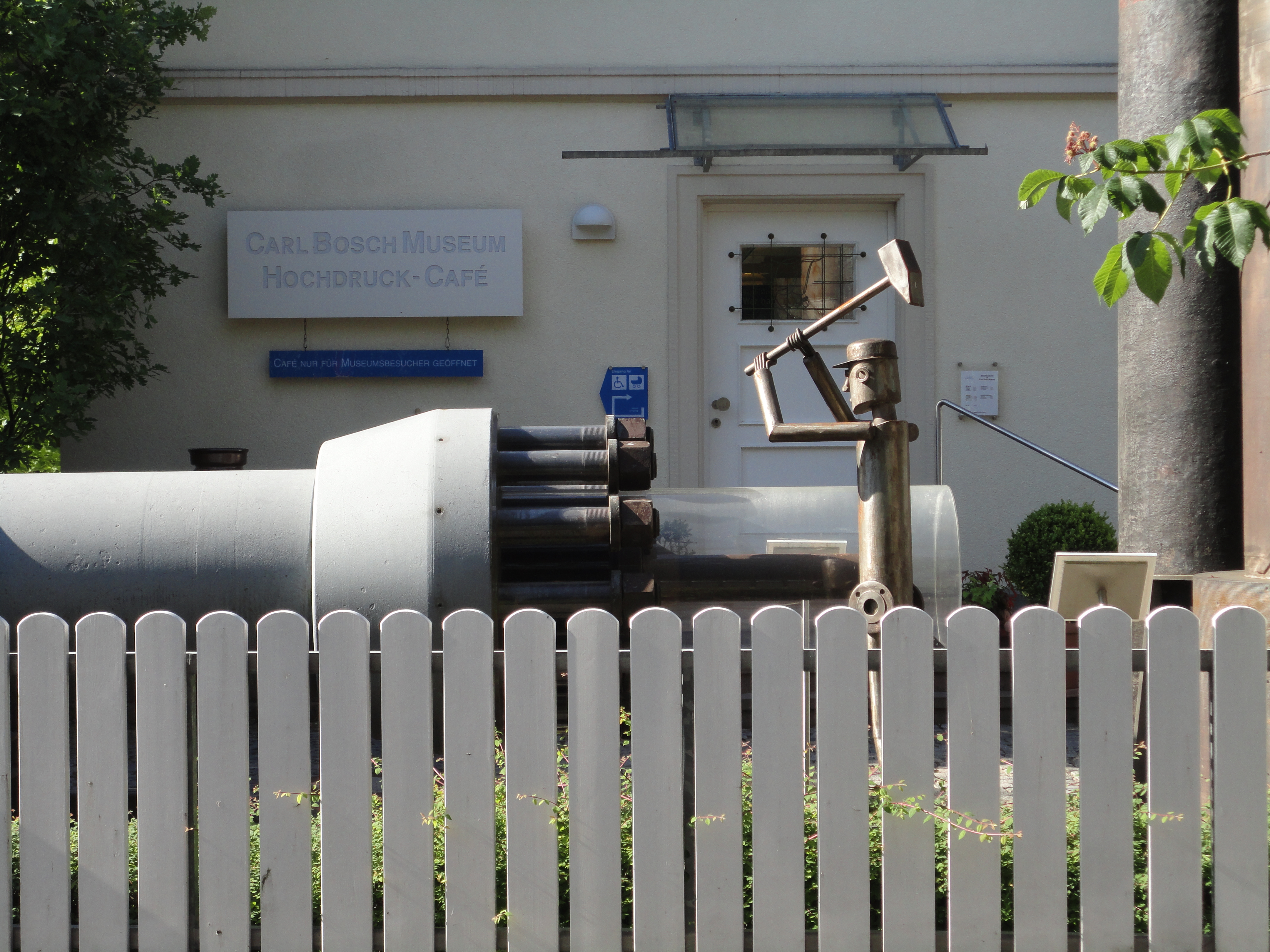 Carl Bosch Museum - Heidelberg